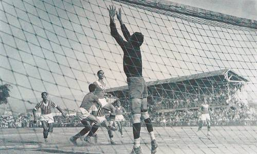 geraldo II goleiro historico do cruzeiro